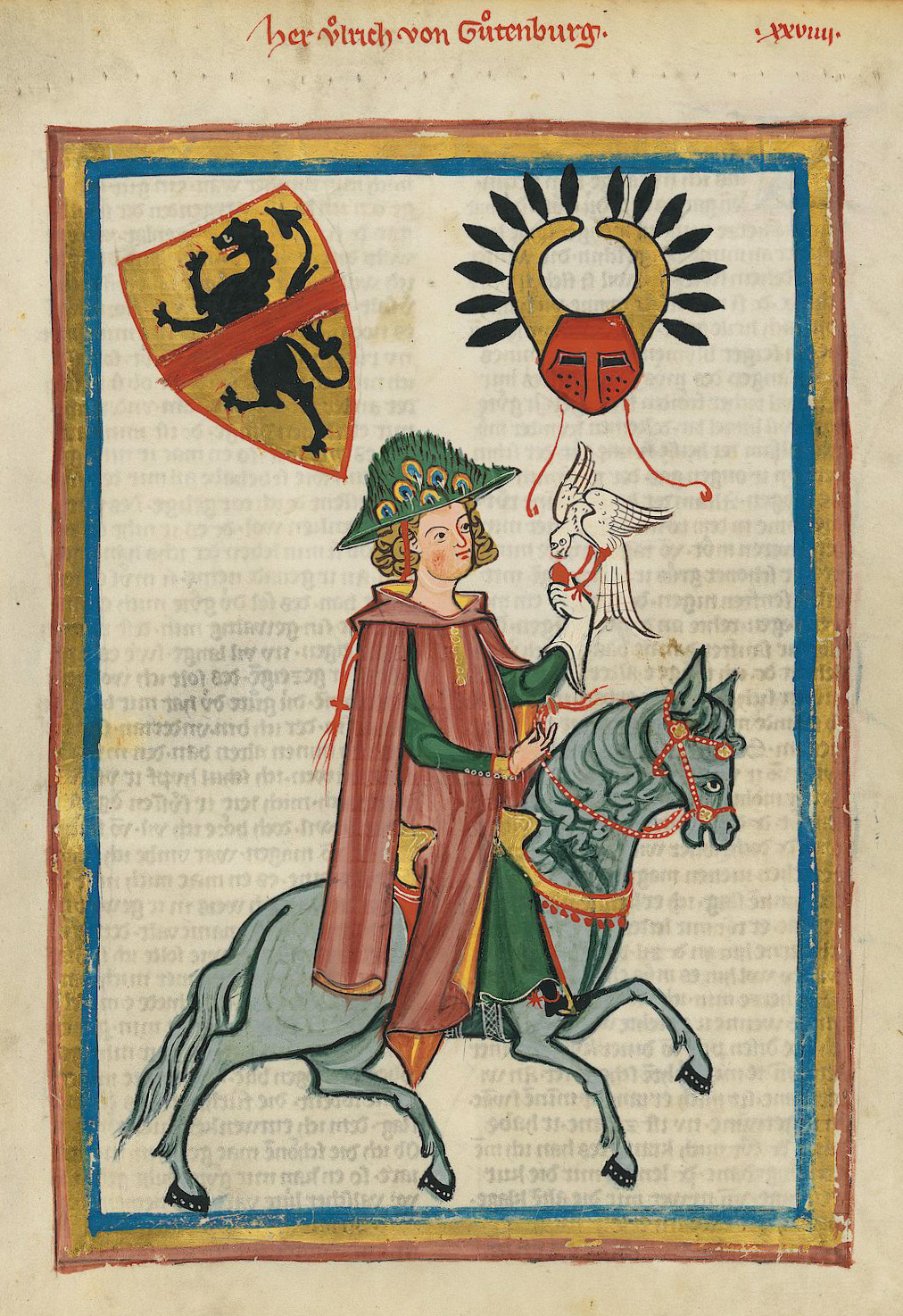 Codex Manesse, UB Heidelberg, Cod. Pal. germ. 848, fol. 73r: Herr Ulrich von Gutenburg